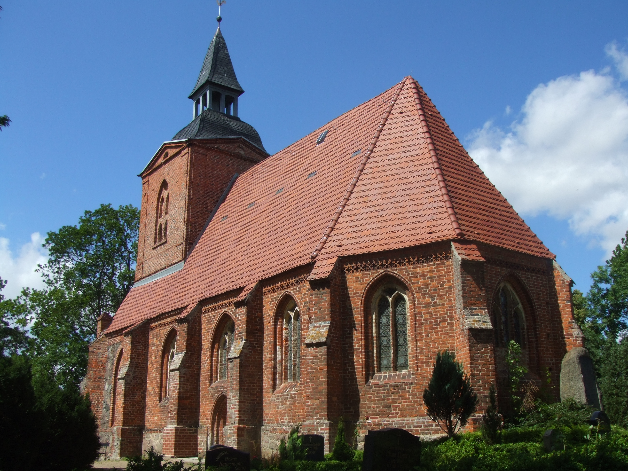 Dorfkirche Trantow, Landkreis Vorpommern-Greifswald, Mecklenburg-Vorpommern